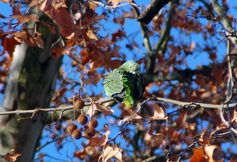 Venezuela-Amazone Amazona amazonica, Schloßpark Biebrich, Wiesbaden, Hessen, Deutschland